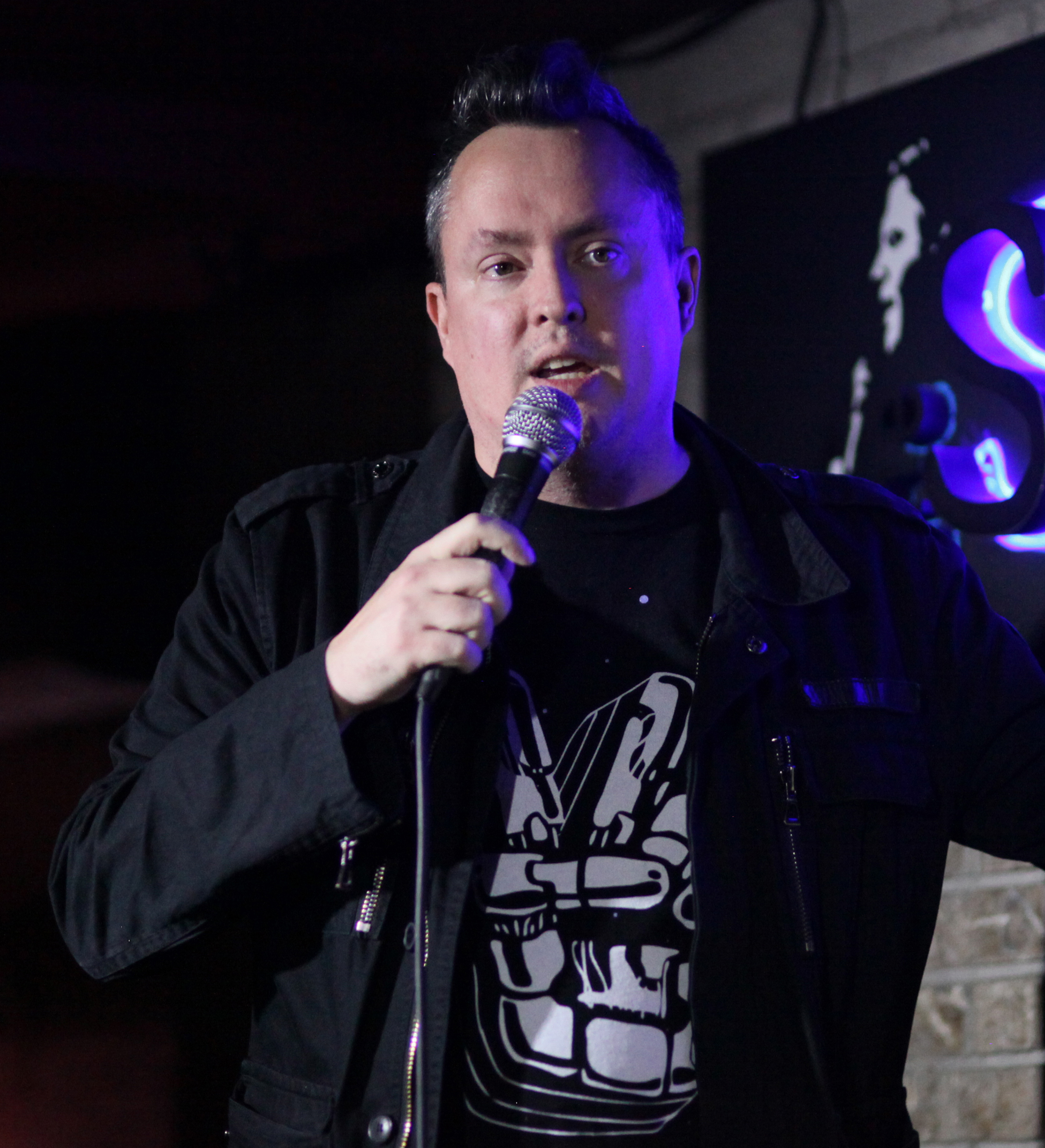 Ward in September 2016.